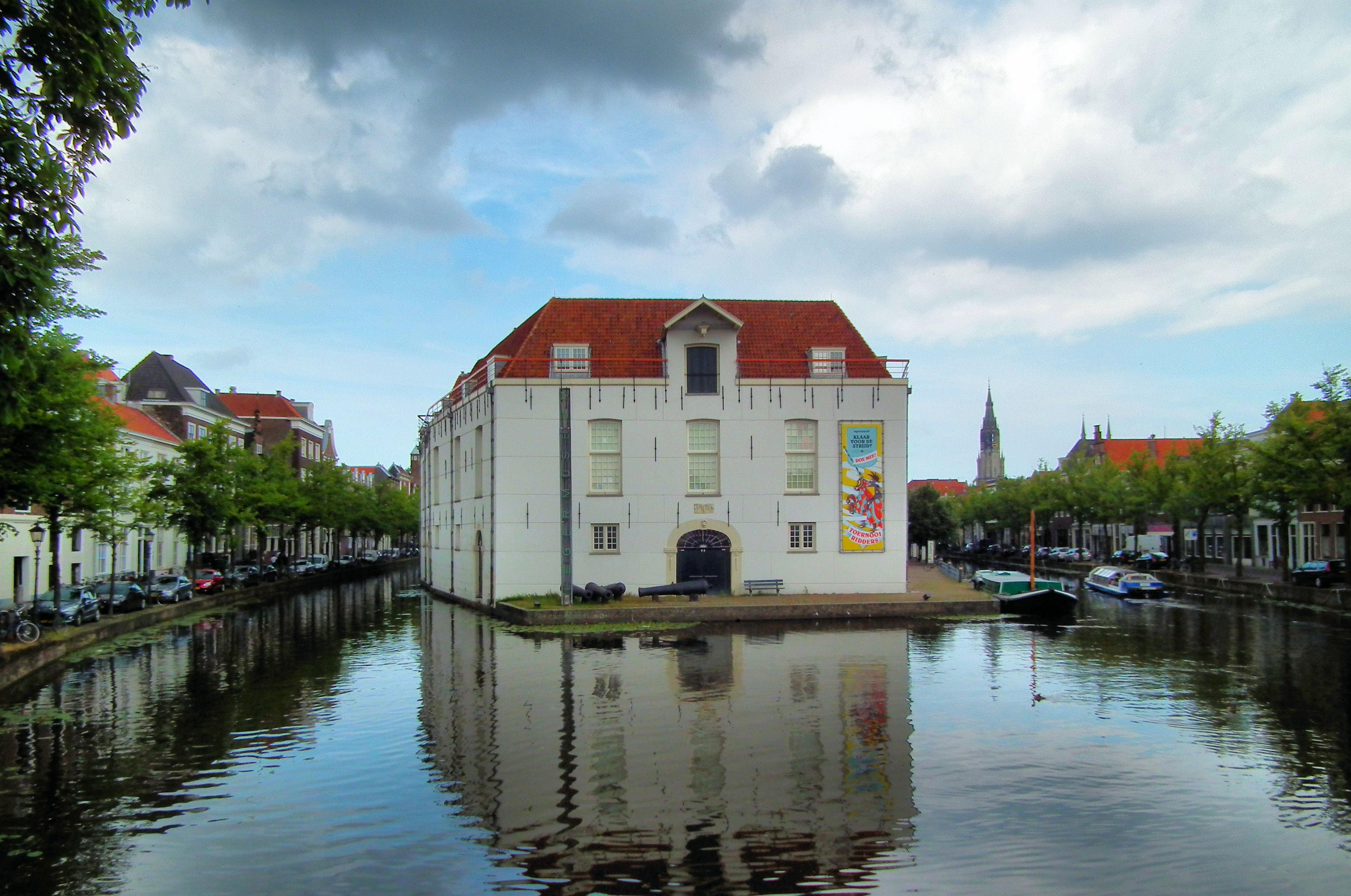 De historische binnenstad van Delft (NL).